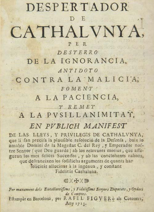 Despertador de Cathalunya, opúsculo propagandístico publicado por la Generalidad de Cataluña en 1713 para justificar la declaración de guerra votada en la Junta General de Brazos el 6 de julio de 1713